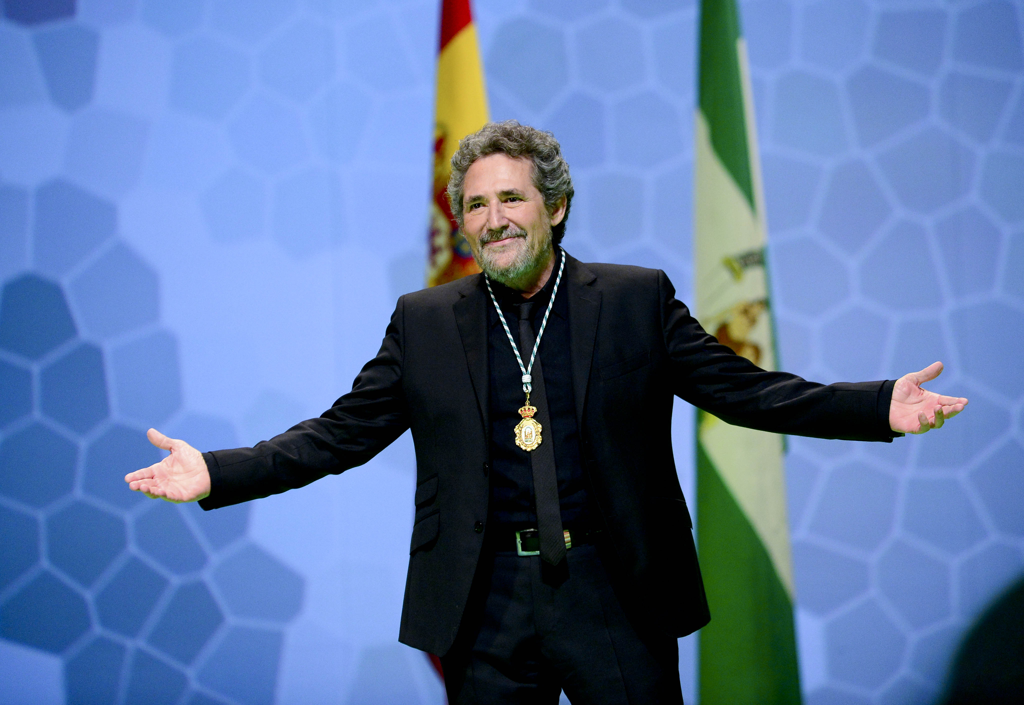 28.02.14 Miguel Rios recibiendo la medalla de Andalucía